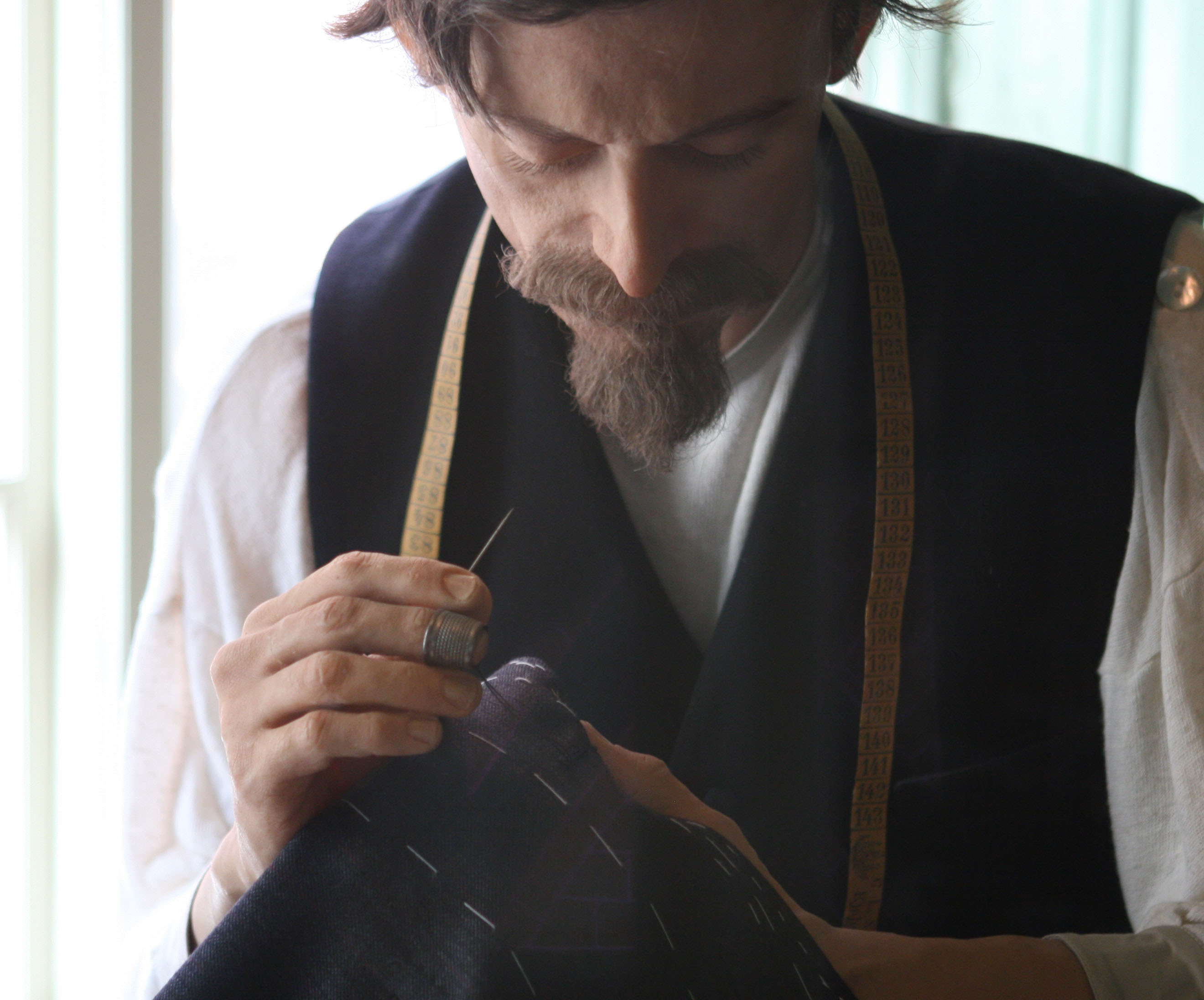 Syring vist i brug på figur i Den gamle By i Aarhus